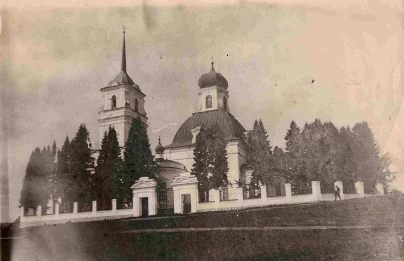 Храм Преображения Господня. Вид с юго-востока. Начало 1900-х годов